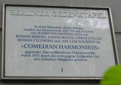 Gedenkschild Comedian Harmonists, Berlin Berlin-Friedenau, Stubenrauch Str. 47 Selbst fotografiert, Mai 2004 GNU FDL